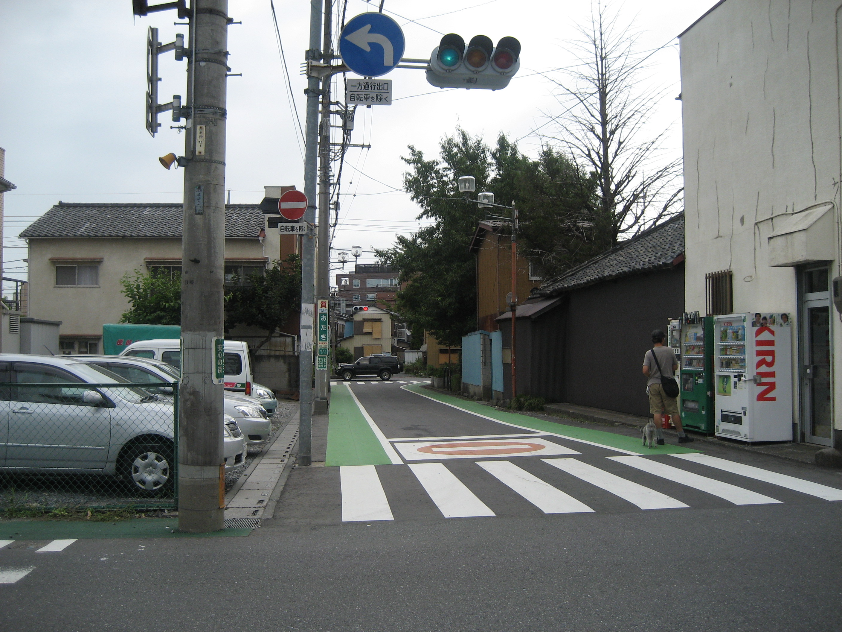 埼玉県道404号線越谷駅方面